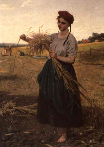 Thomas Simon Cool, De schovenbindster (olie op linnen)